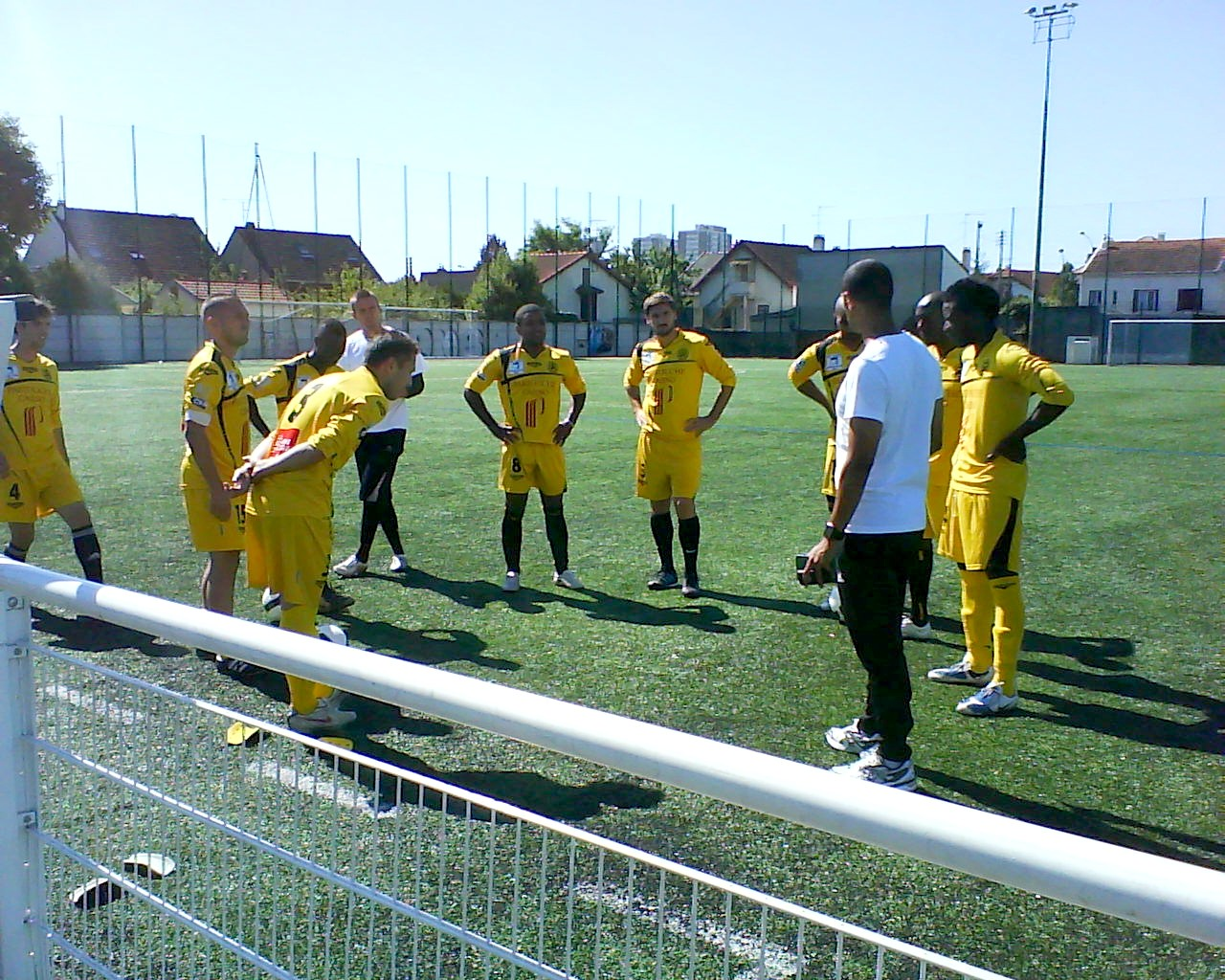 L'entraîneur adjoint donne ses consignes aux joueurs avant le match amical JA Drancy-UJA Alfortville du 18 juillet 2010.